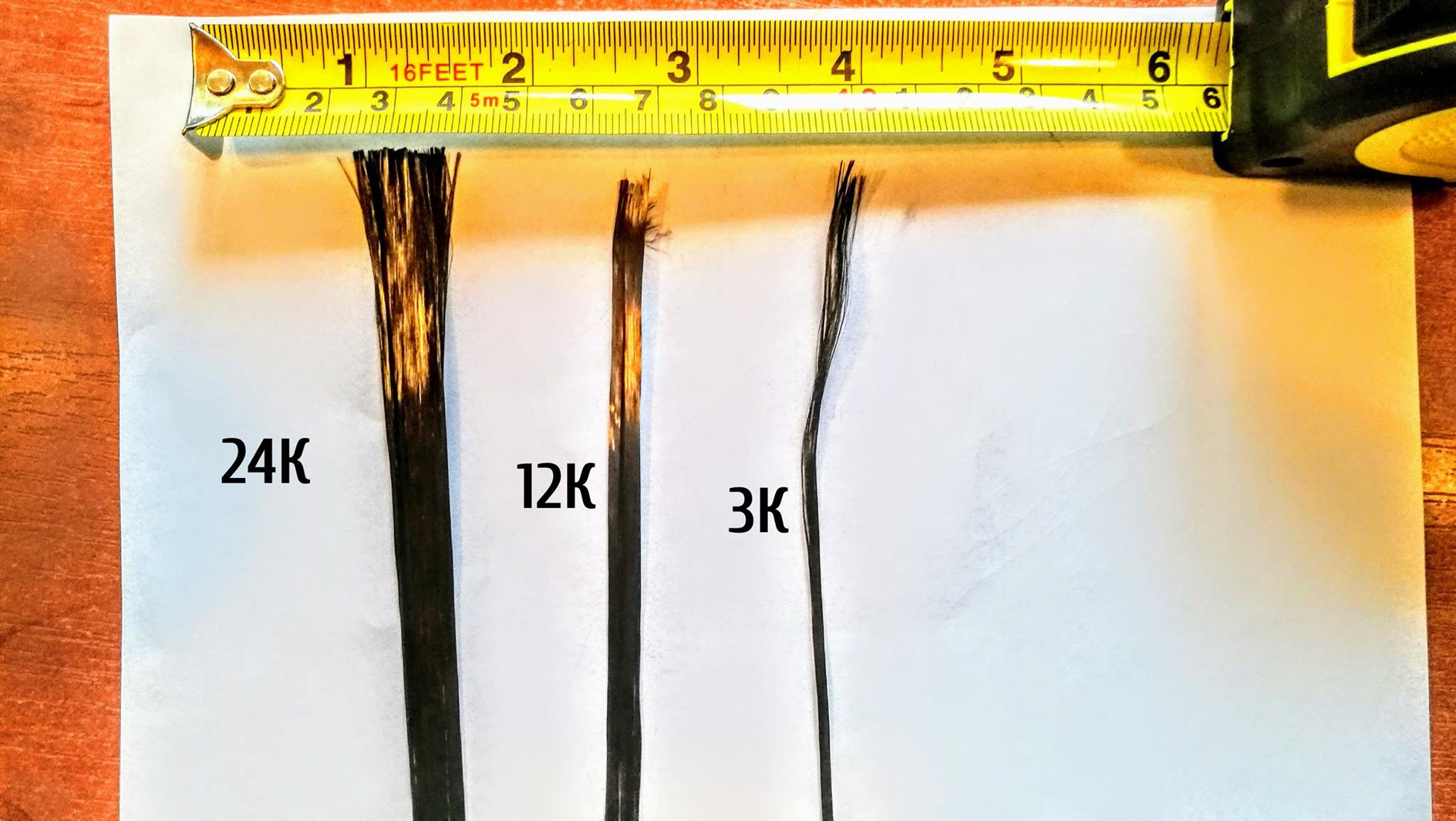 Углеродное волокно 3К, 12К, 24К